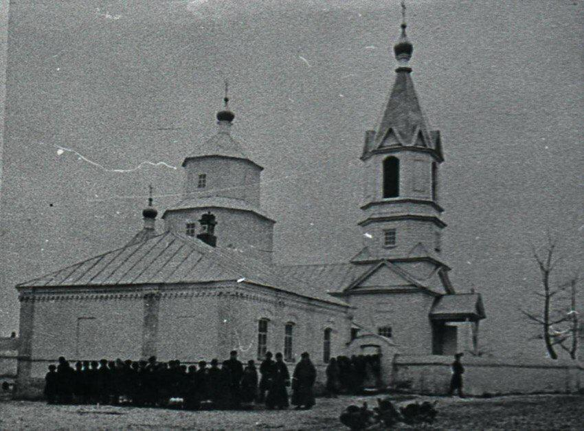 фото зруйнованої церкви